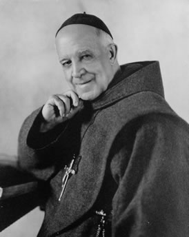 Le frère Paul Wattson, fondateur des Franciscains de l'Atonement.